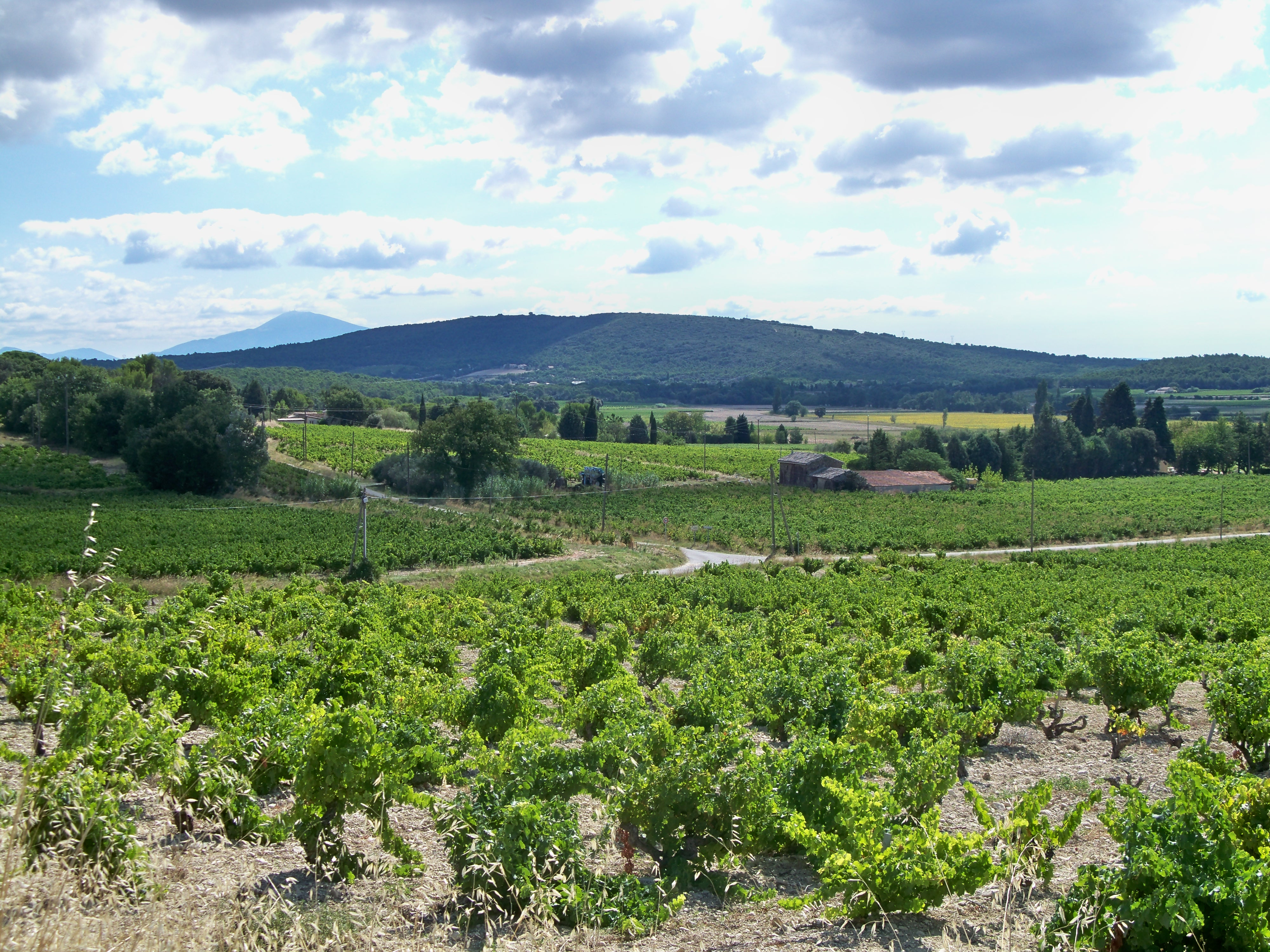 Vignoble près de Rochegude, Drôme, France